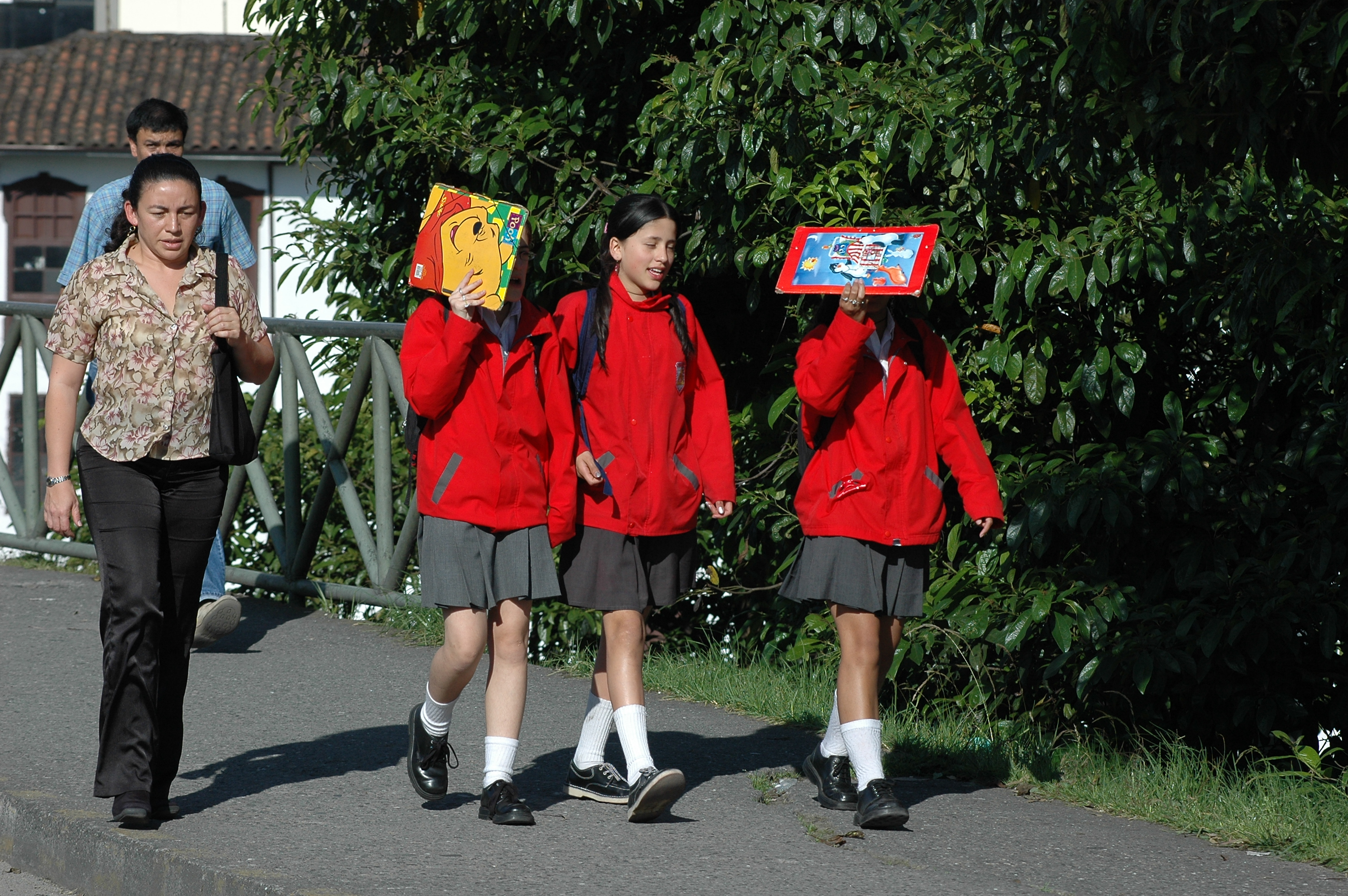 Scolarité Colombienne